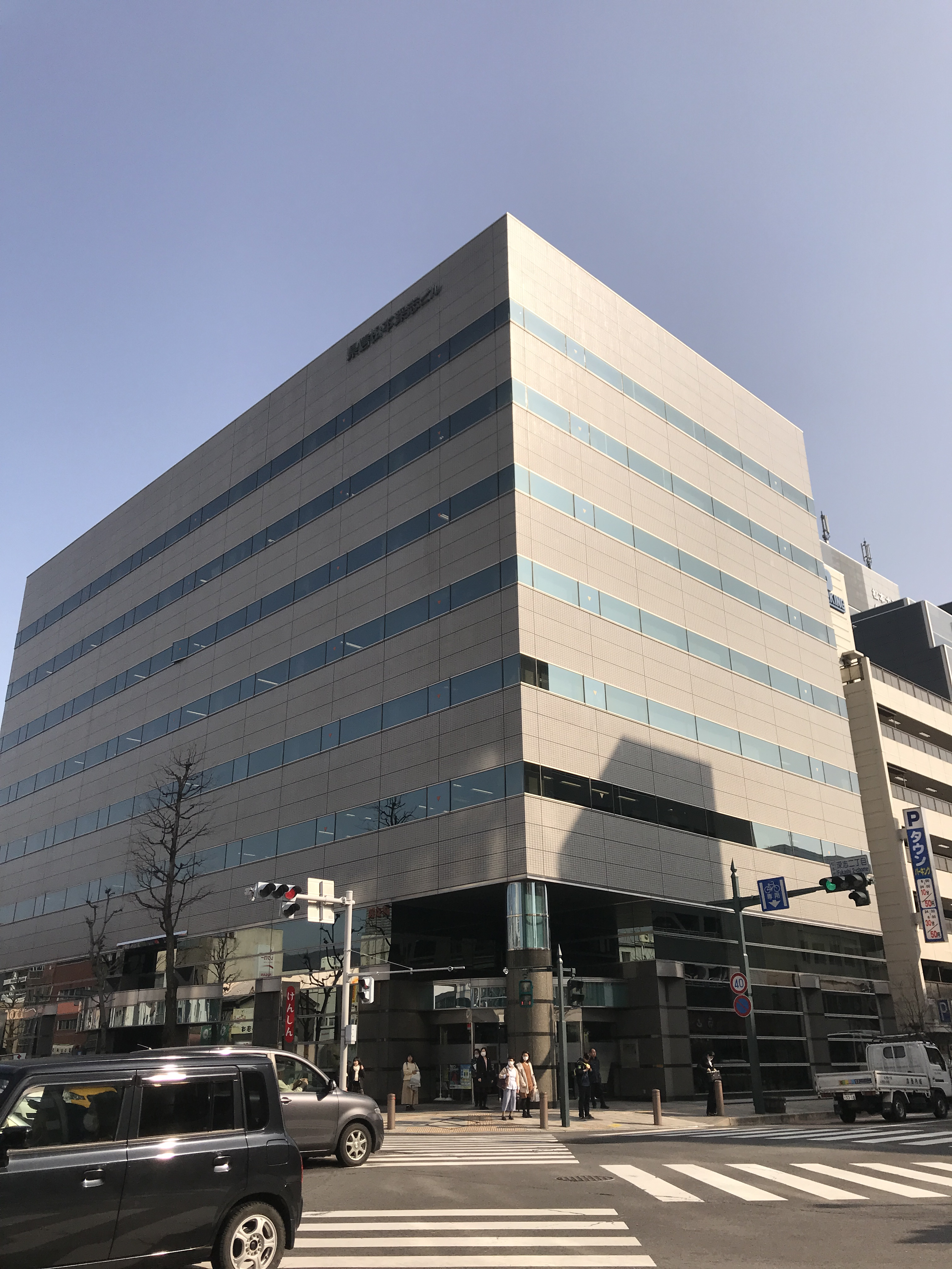 長野県信用組合松本支店や、中外製薬、オムロン、日本化薬などが入居する長野県信用組合松本支店ビル。